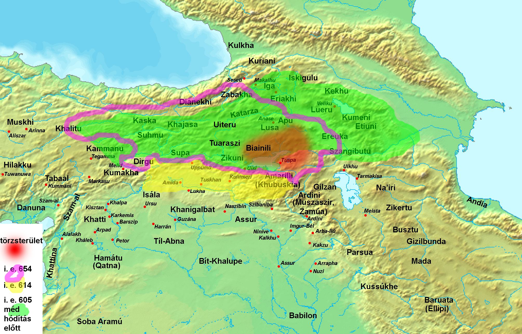 Urartu területváltozásai i. e. 658-605 között